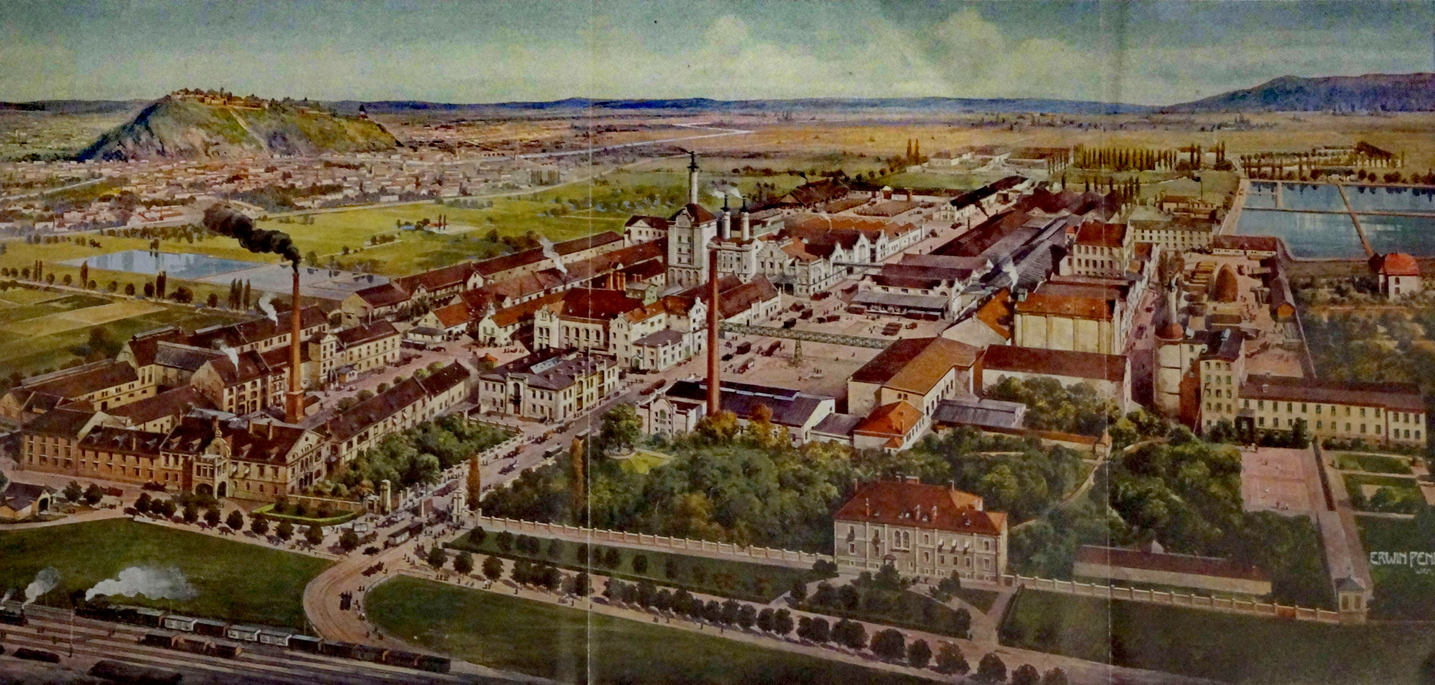 Die historische Schausammlung und Dauerausstellung „360GRAZ | Die Stadt von allen Zeiten“ zeigt die politische, wirtschaftliche und soziale Geschichte der Stadt Graz in einer offenen Form. In diesem thematisch und chronologisch geordneten Schaudepot wird die Geschichte von Graz dargestellt.